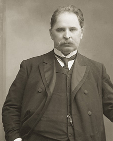 Antanas Vileišis